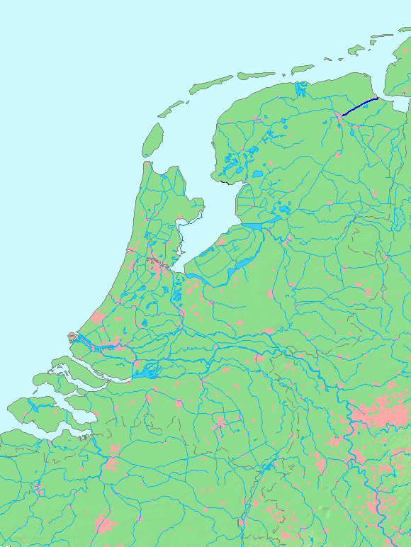 Eemskanaal